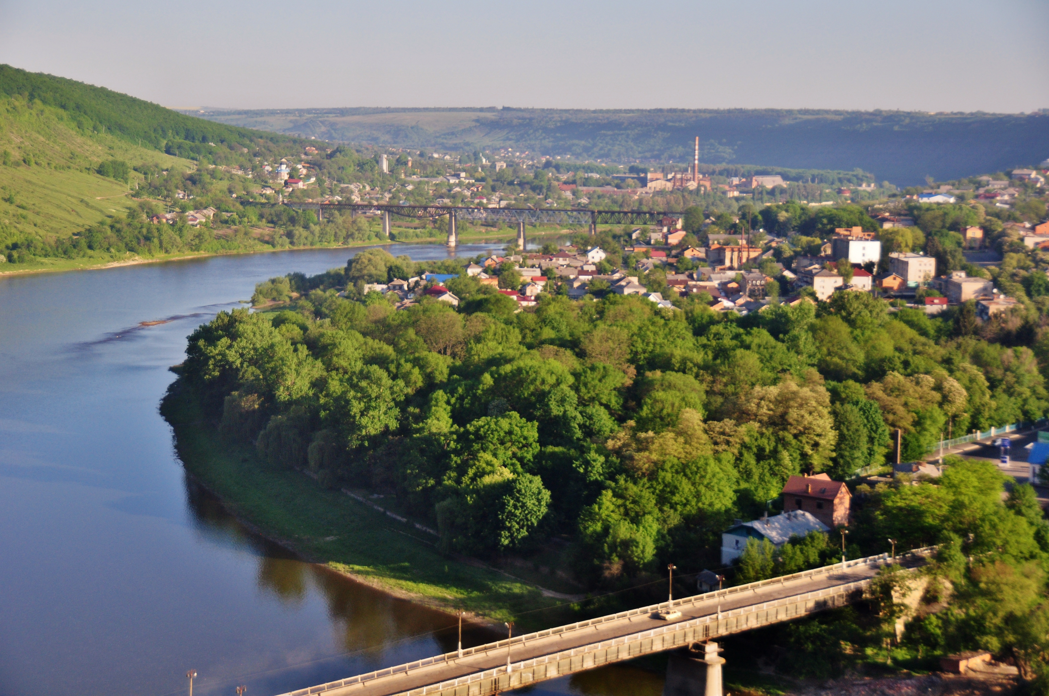 Заліщицький парк з високого берега Дністра коло с.Хрещатик